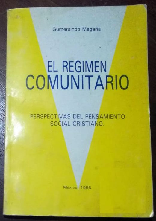 Portada de "El Régimen Comunitario. Perspectivas del Pensamiento Social Cristiano", México, 1985. Gumersindo Magaña Negrete.